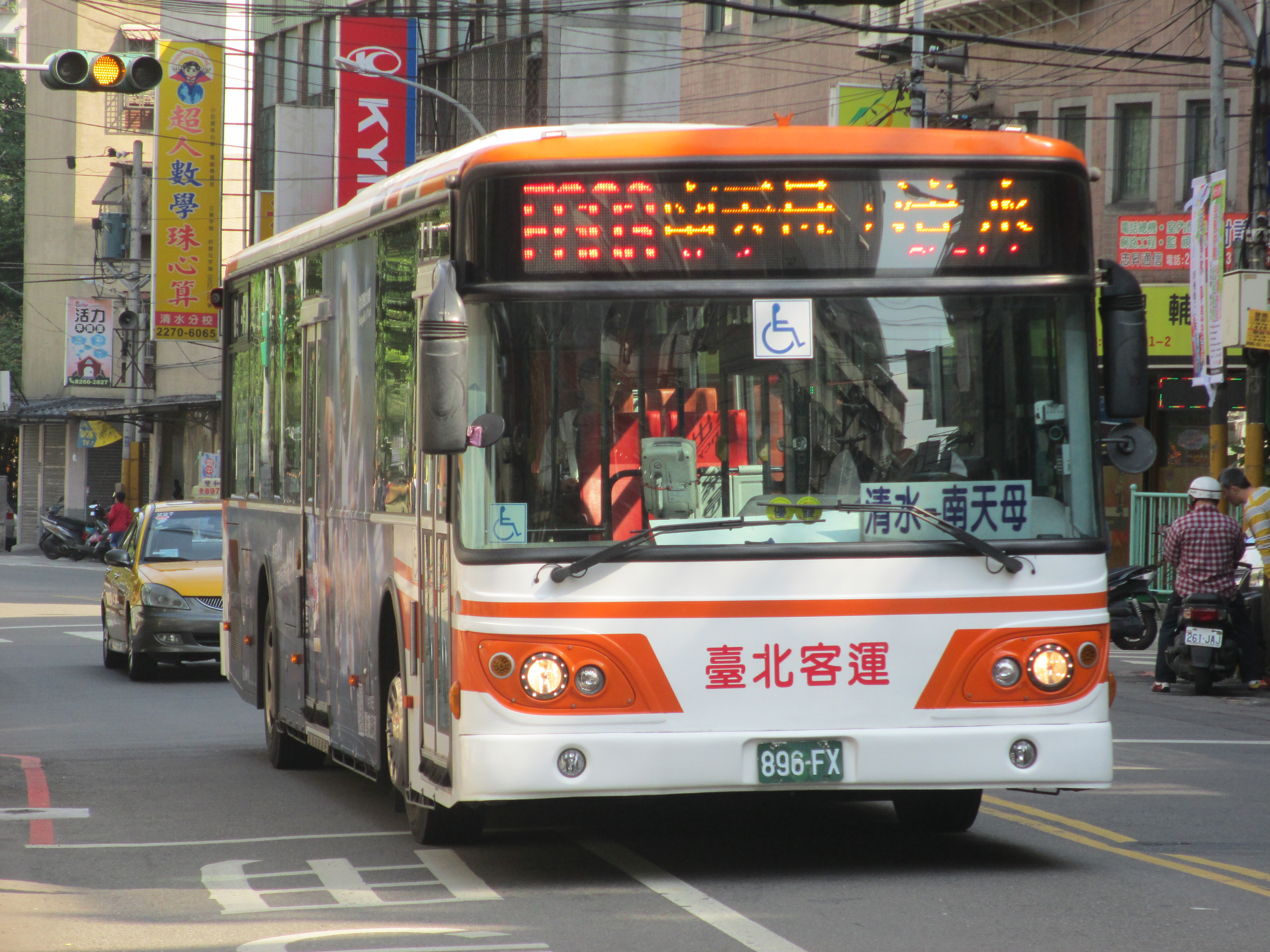 臺北客運2013年大宇BS120CN大客車896-FX，行駛新北市新巴士F603線。